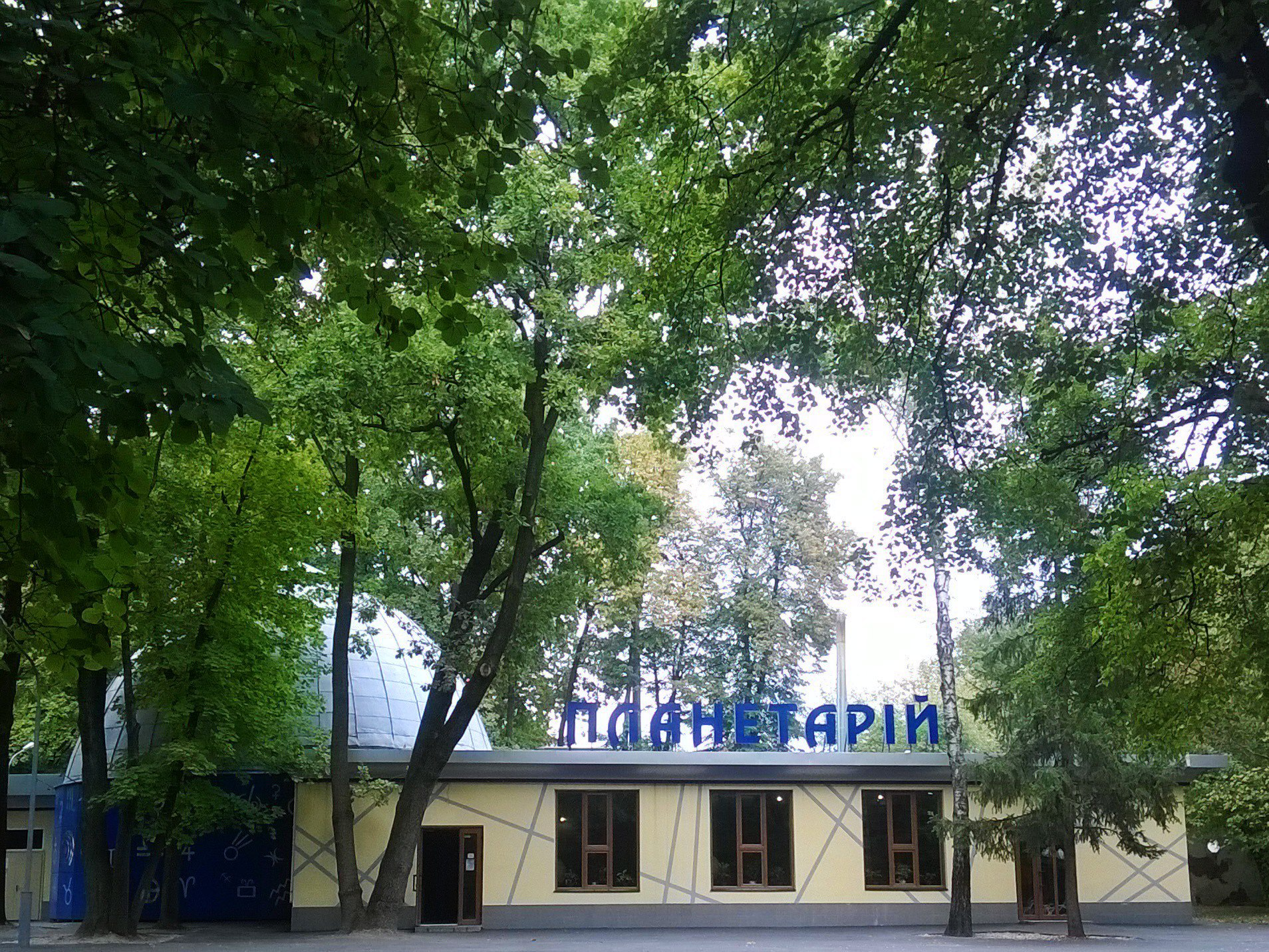 Вінницький планетарій у вересні 2016 року